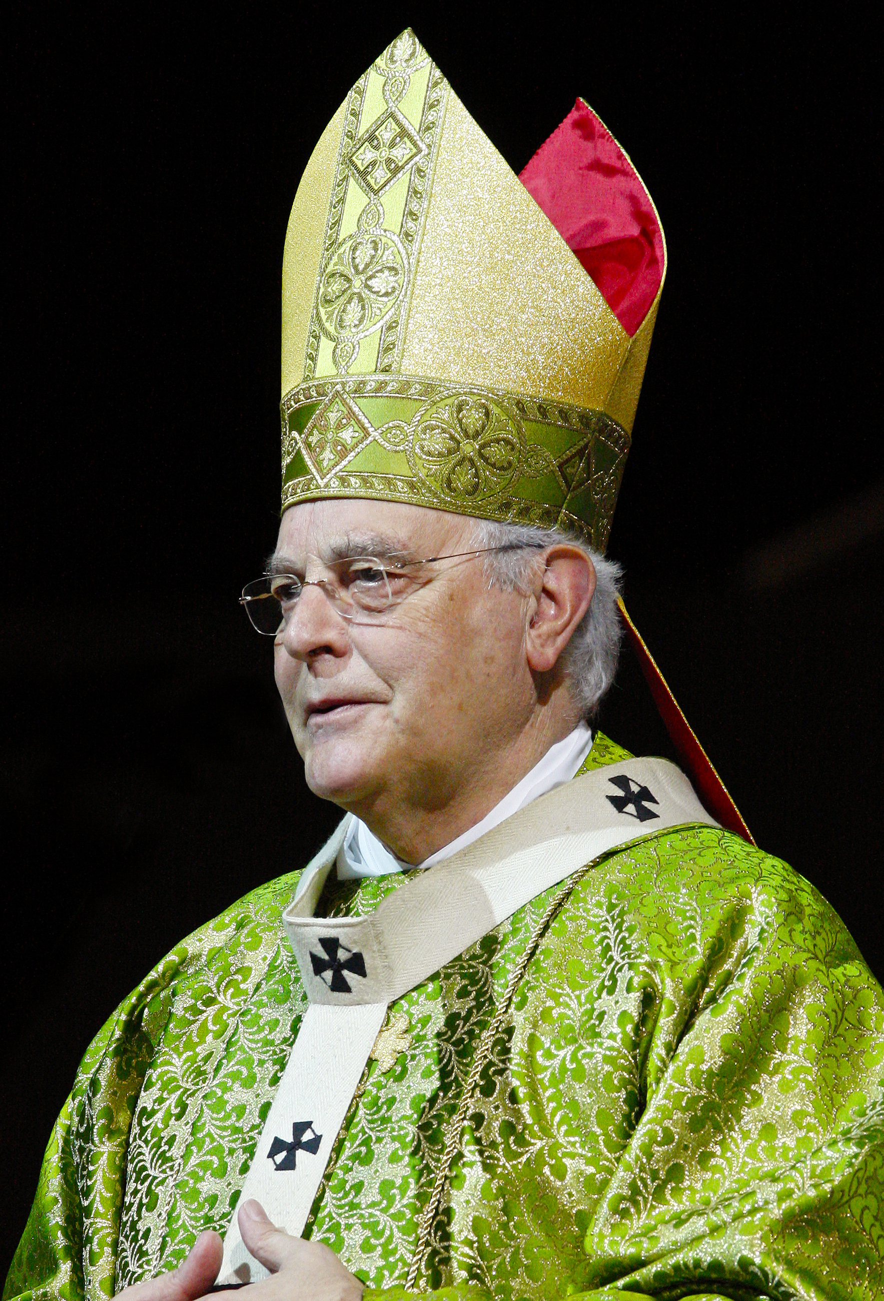 Monseñor Carlos Amigo Vallejo, Cardenal, Arzobispo de Sevilla.